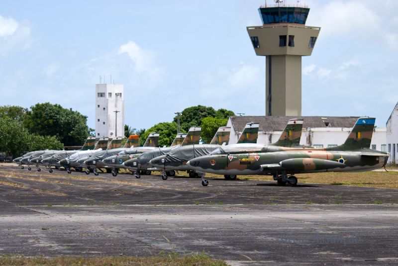 Base Aérea de Natal com aviões durante a Cruzex IV 2008 em Natal, Rio Grande do Norte, Brasil